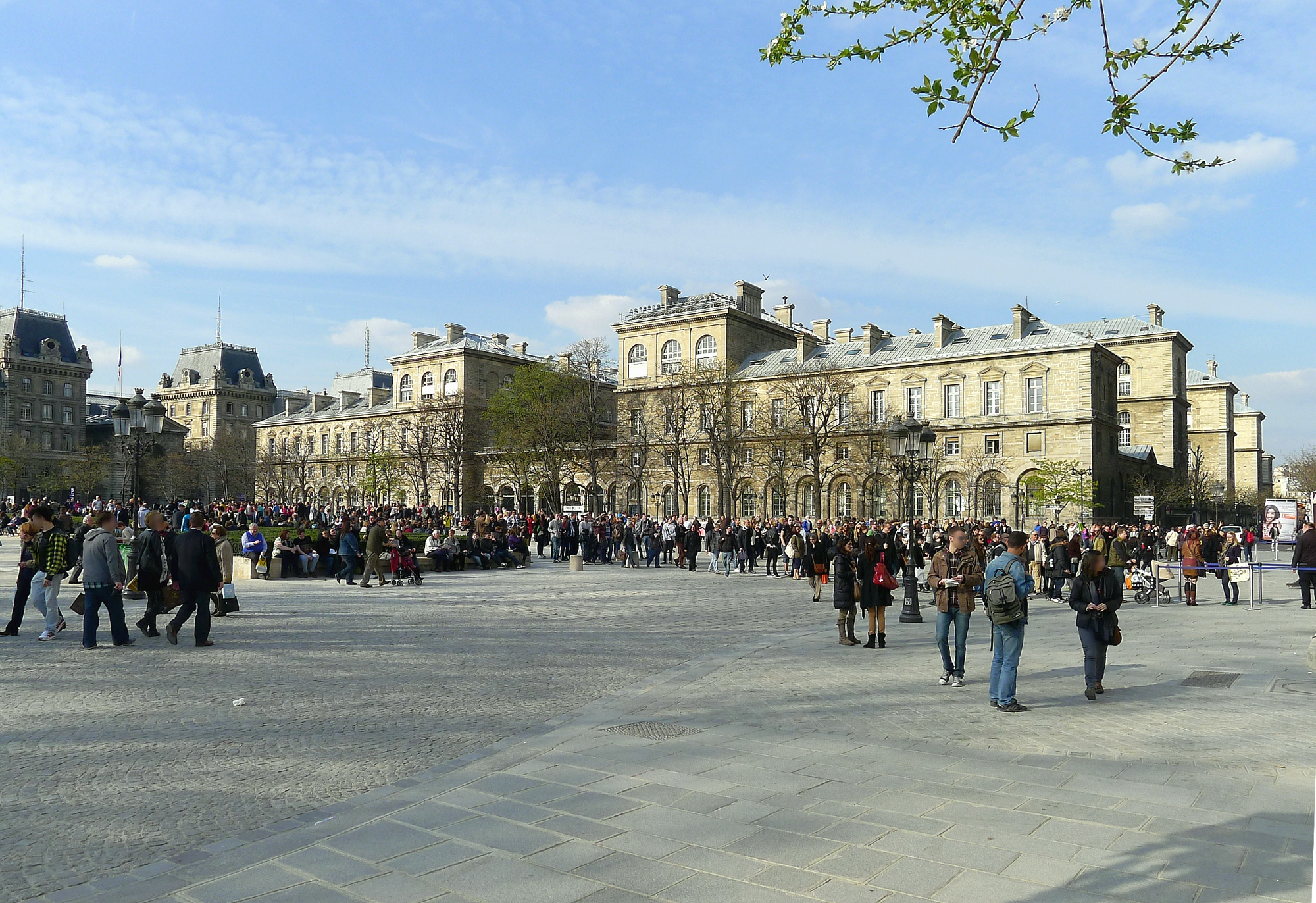 Place Jean-Paul II avec en arrière-plan l'Hôtel-Dieu - Paris IV